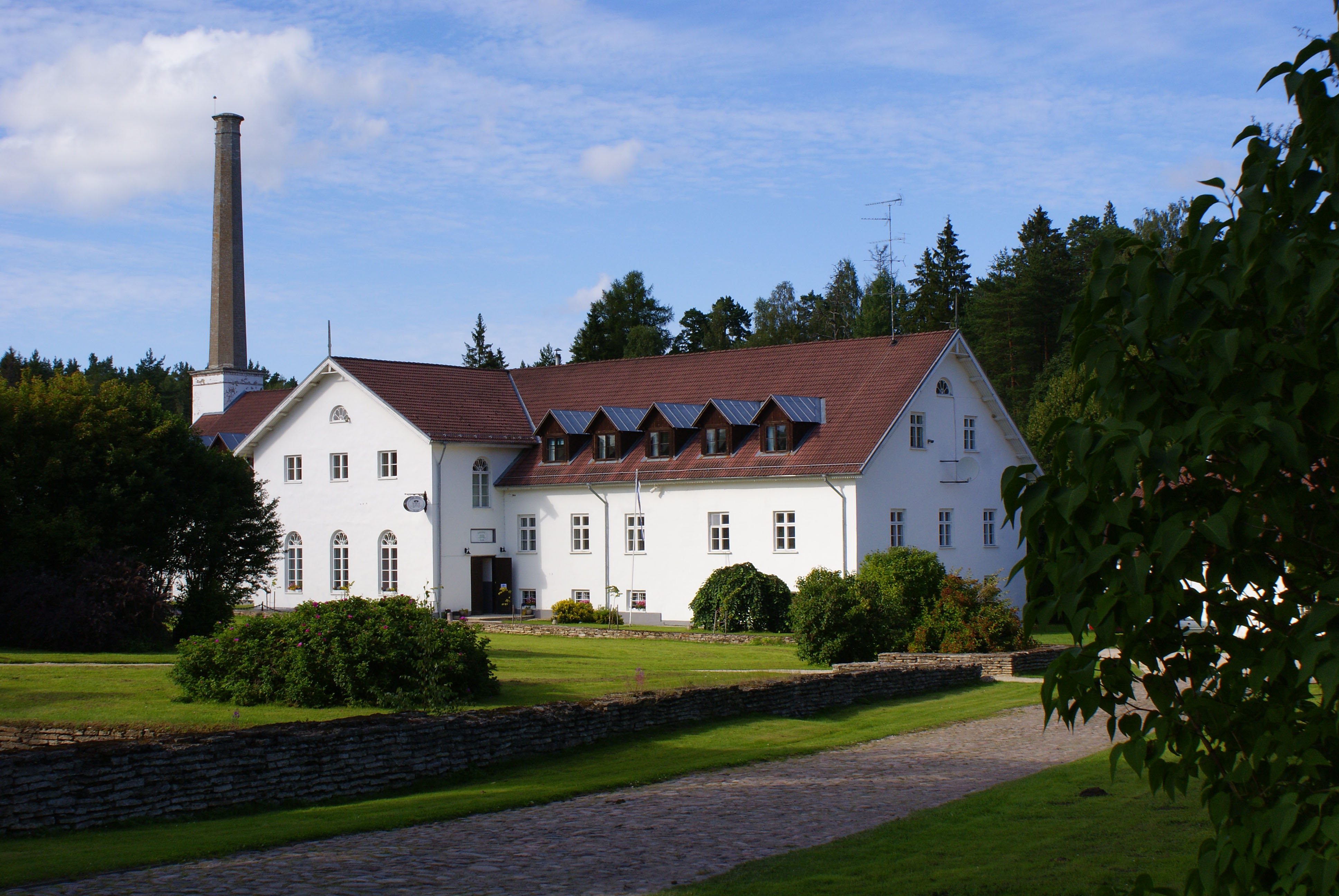 Palmse mõisa viinavabrik